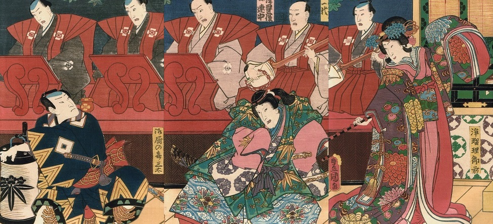 常磐津連中の出語り図。柿色の肩衣が特徴。「御曹司牛若丸」常磐津豊後大掾連中。1860年。